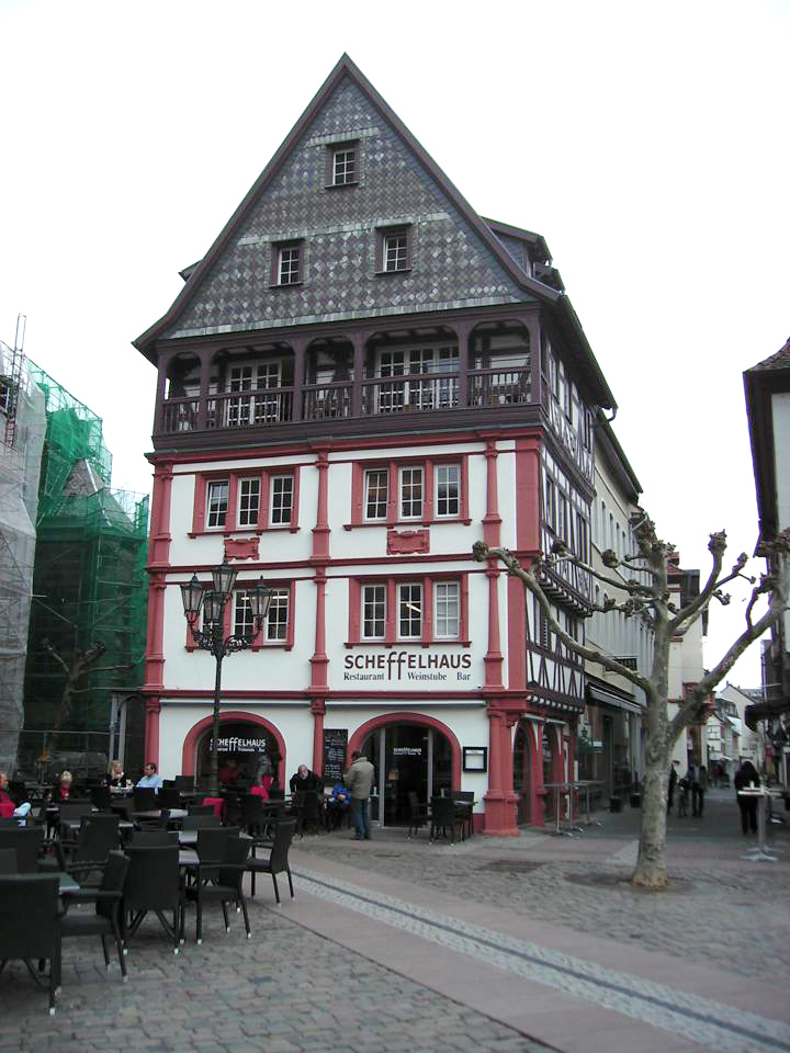 Neustadt (Weinstraße): Rathausplatz mit Scheffelhaus